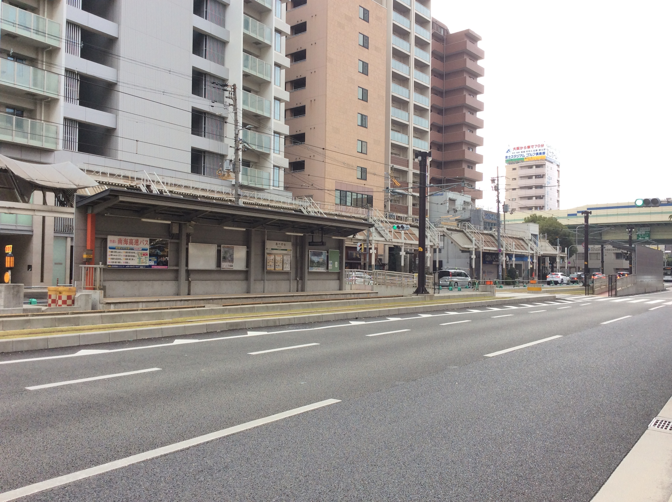 阪堺阿倍野駅